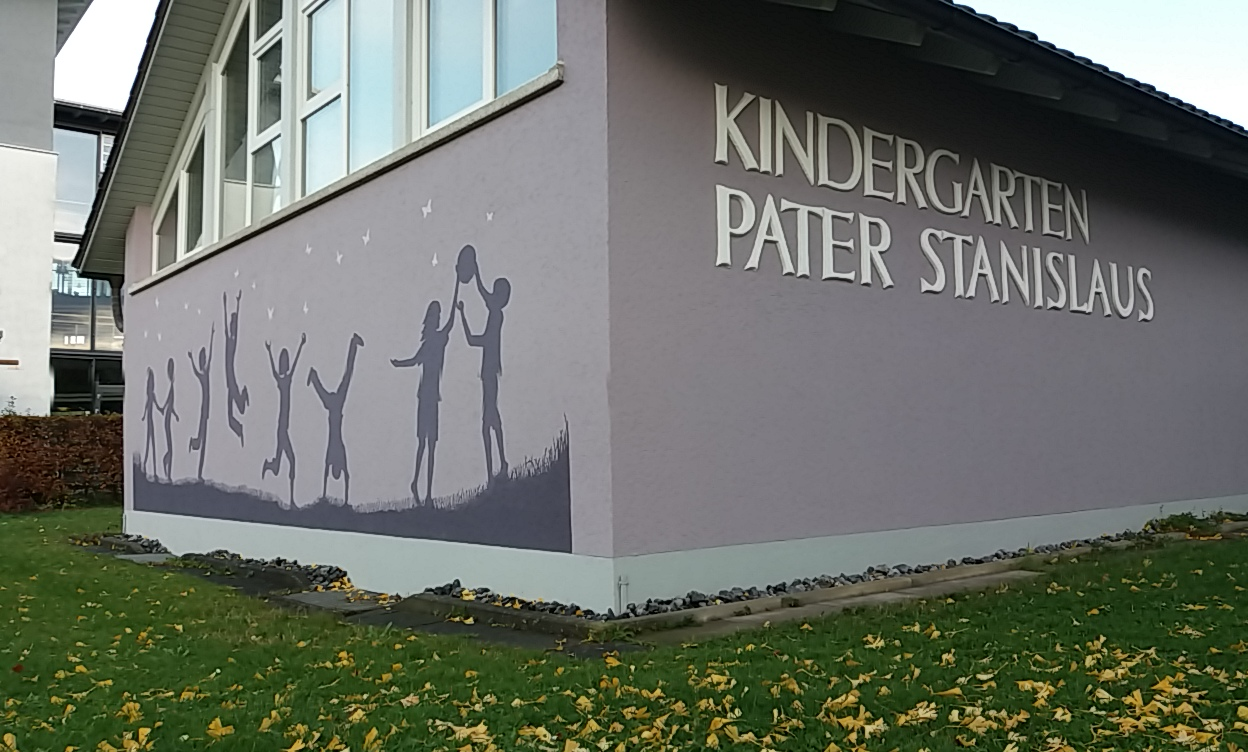 Der Kindergarten in Wutöschingen, Landkreis Waldshut in Baden-Württemberg, ist nach einer „Persönlichkeit der Gemeinde“, Pater Stanislaus / Michael Saurbeck (1595-1647) benannt.